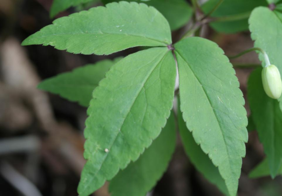 Anemone trifolia - Le foglie. Località: Val Piana, Limana (BL), 850 m s.l.m.